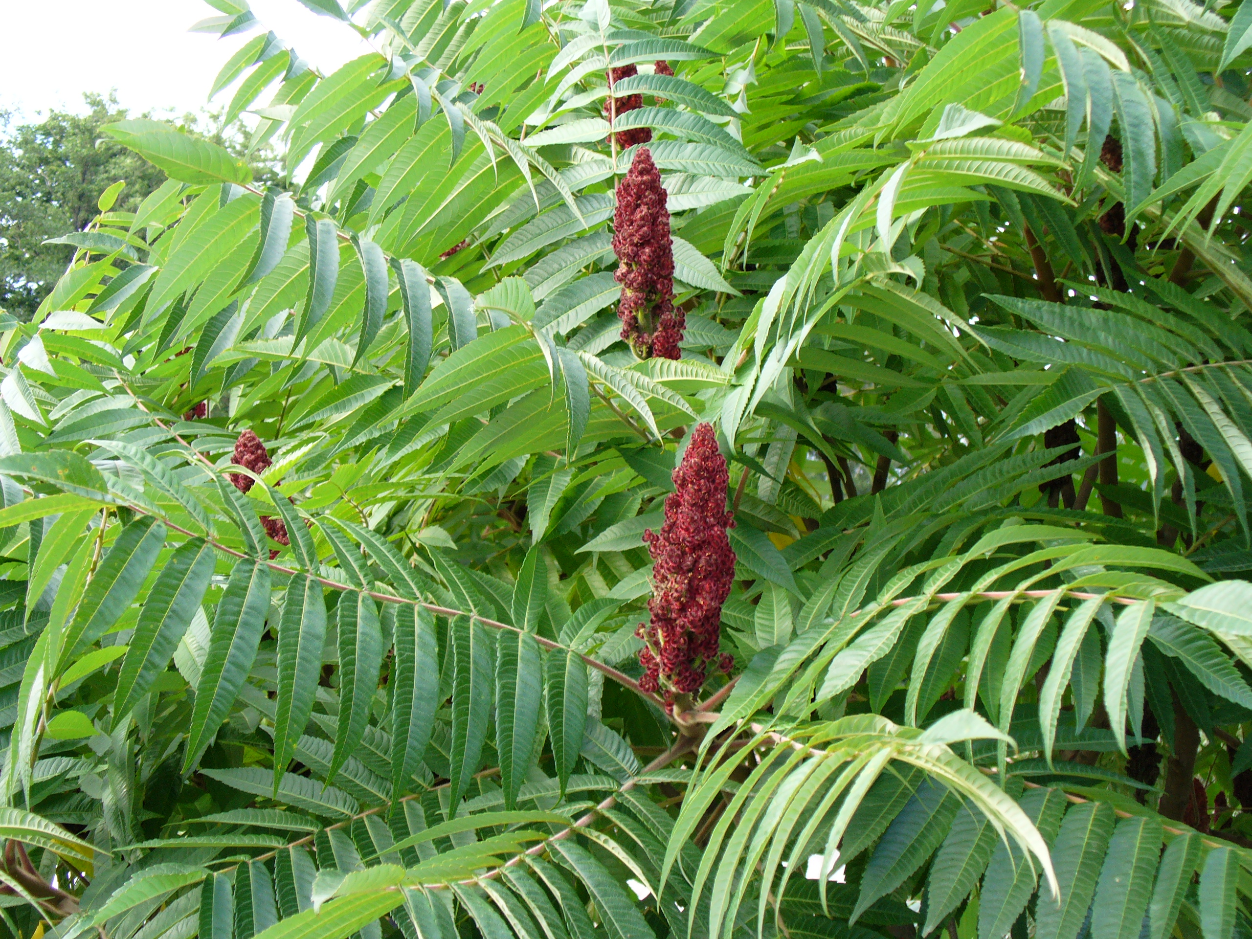 Fotografie Jiří Zelenka. Příroda Vysočiny